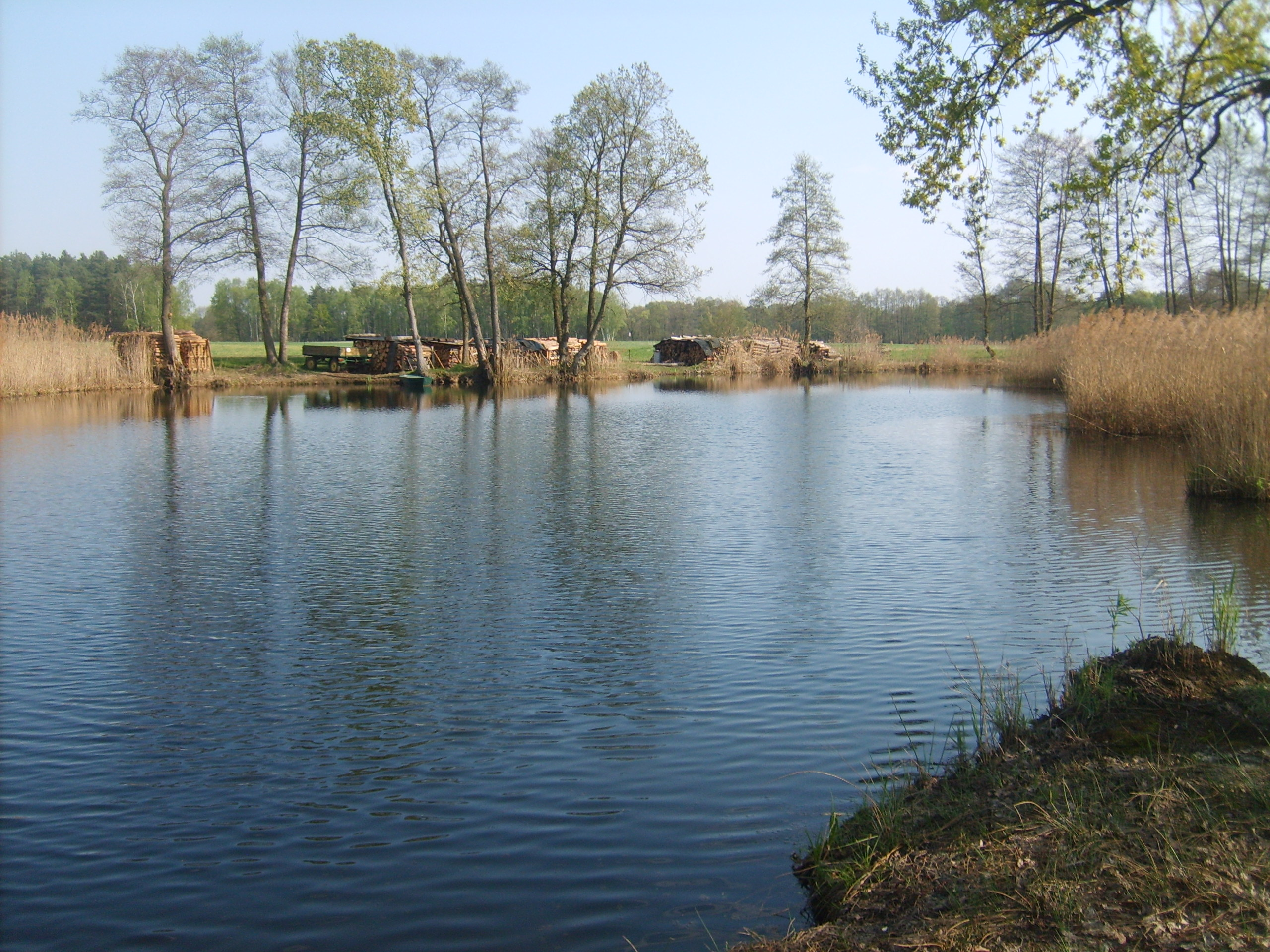 Alter Flußlauf der Schwarzen Elster bei Zeischa